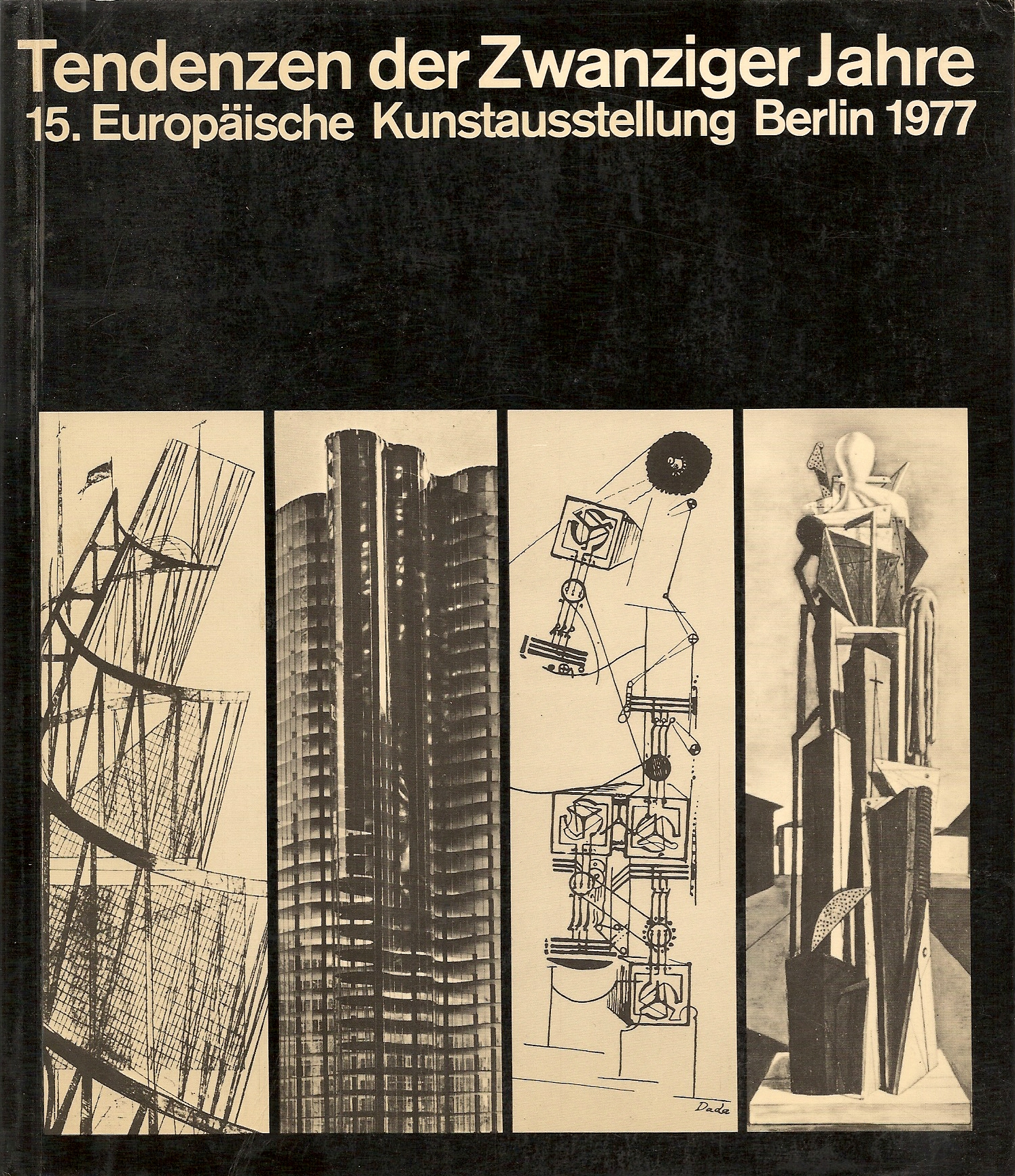 Das vielschichtige Thema verlangte nach differenzierter Darstellung. So gliedert sich die Austellung in vier Abteilungen: "Vom Konstruktivismus zur konkreten Kunst", "Von der futuristischen zur funktionellen Stadt - Planen und Bauen in Europa von 1913-1933", "Dada in Europa - Werke und Dokumente", "Die neue Wirklichkeit - Surrealismus und Neue Sachlichkeit".